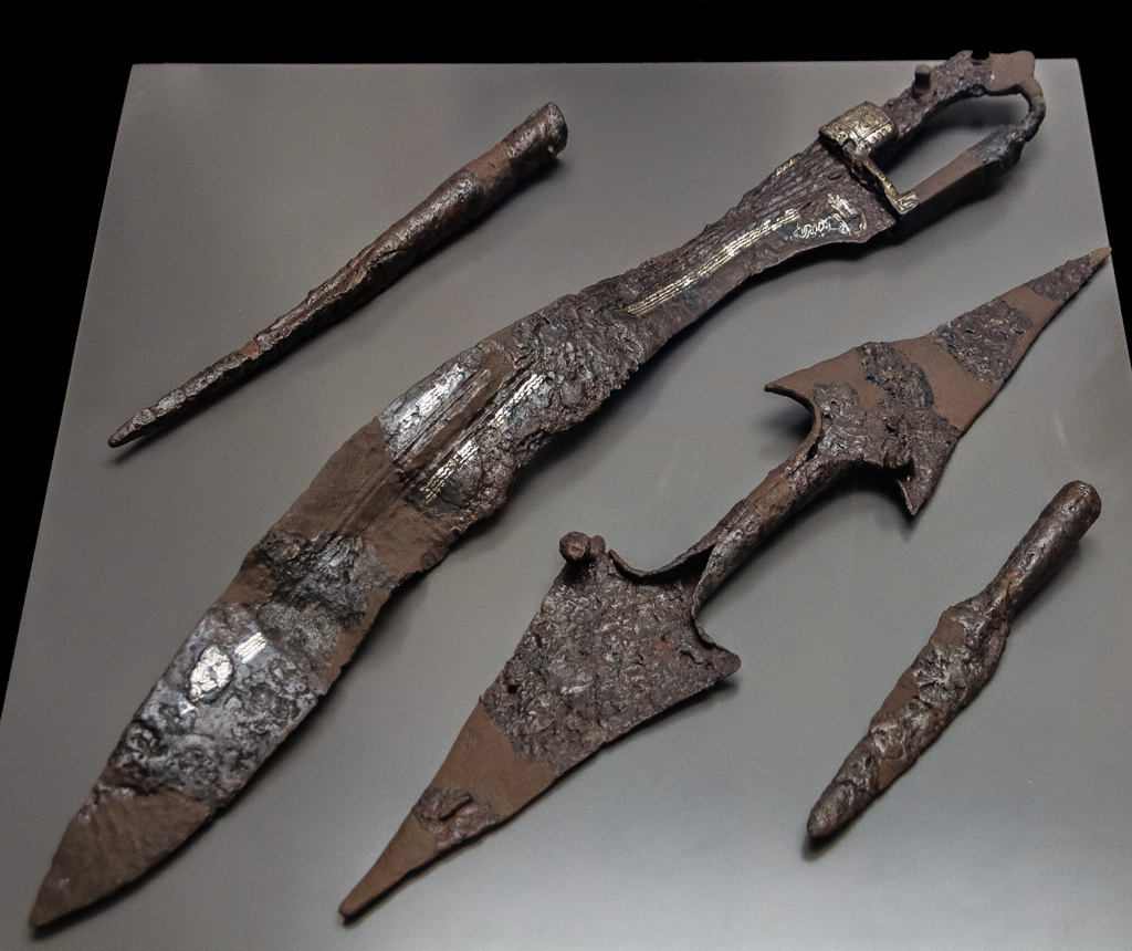 Falcata y otras armas de hierro de la necrópolis del oppidum ibérico de Alarcos.